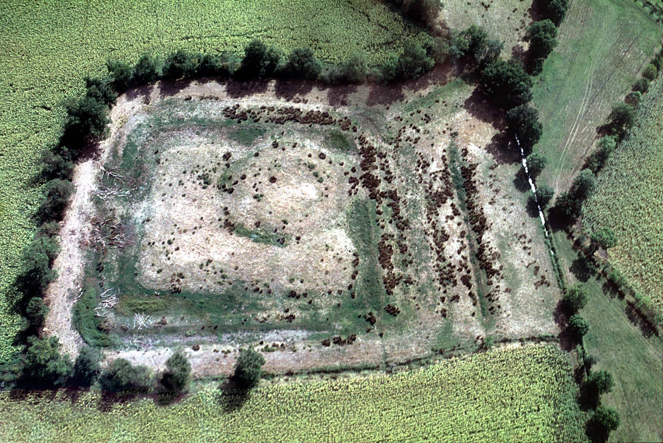 photo aérienne de CHAMPDOLENT (17) Prés du Vieux Château. Époque médiévale. Extraordinaire vision des douves, des murailles et du donjon d'un château disparu. La légende locale prétend qu'il aurait été rasé par Charlemagne… Remarquer la continuité impliquée par la signification toponymique ! Au sol, on ne distingue absolument rien d'autre qu'un pré entouré de haies, avec des touffes d'herbes éparses et quelques fossés …